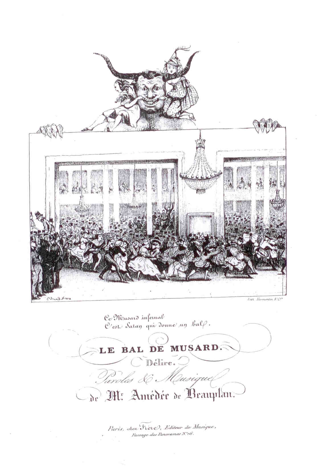 Partition